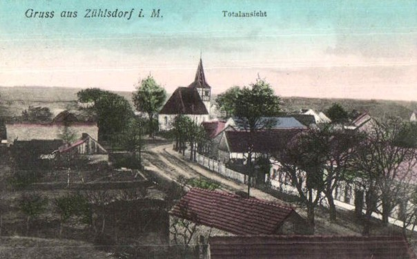 Zühlsdorf Gemeinde Mühlenbecker Land